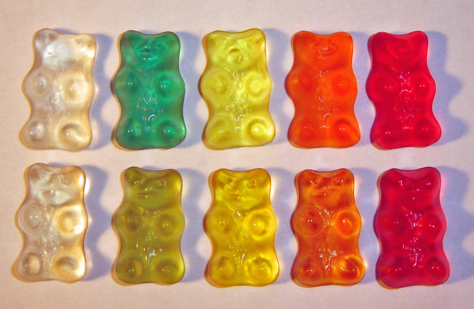 Die unteren Gummibärchen stammen aus der Schweiz (identisch mit den deutschen) und die oberen aus Frankreich.